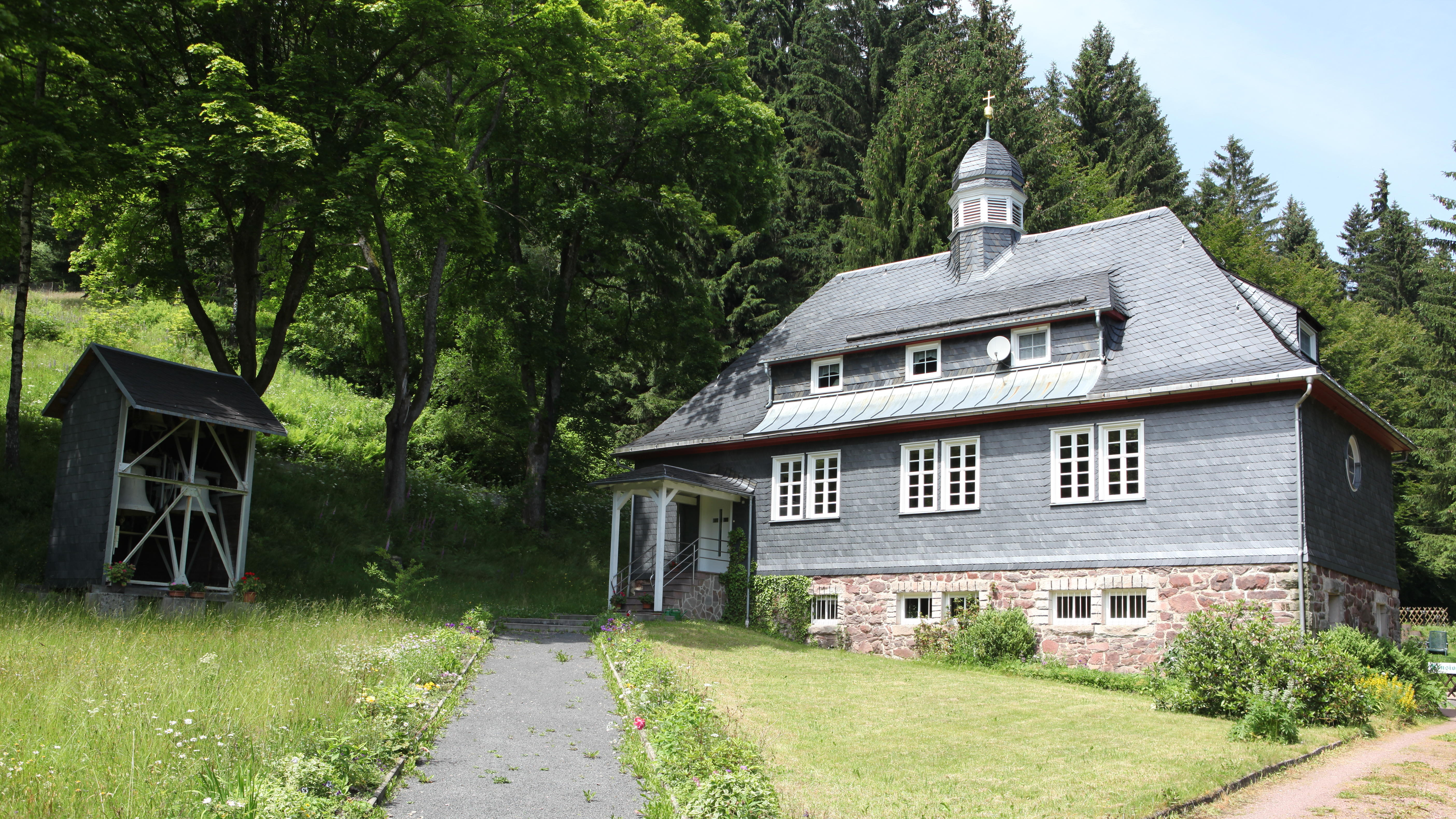 Evangelisches Kirchengemeindehaus Fehrenbach in Fehrenbach, OT von Masserberg, Thüringen